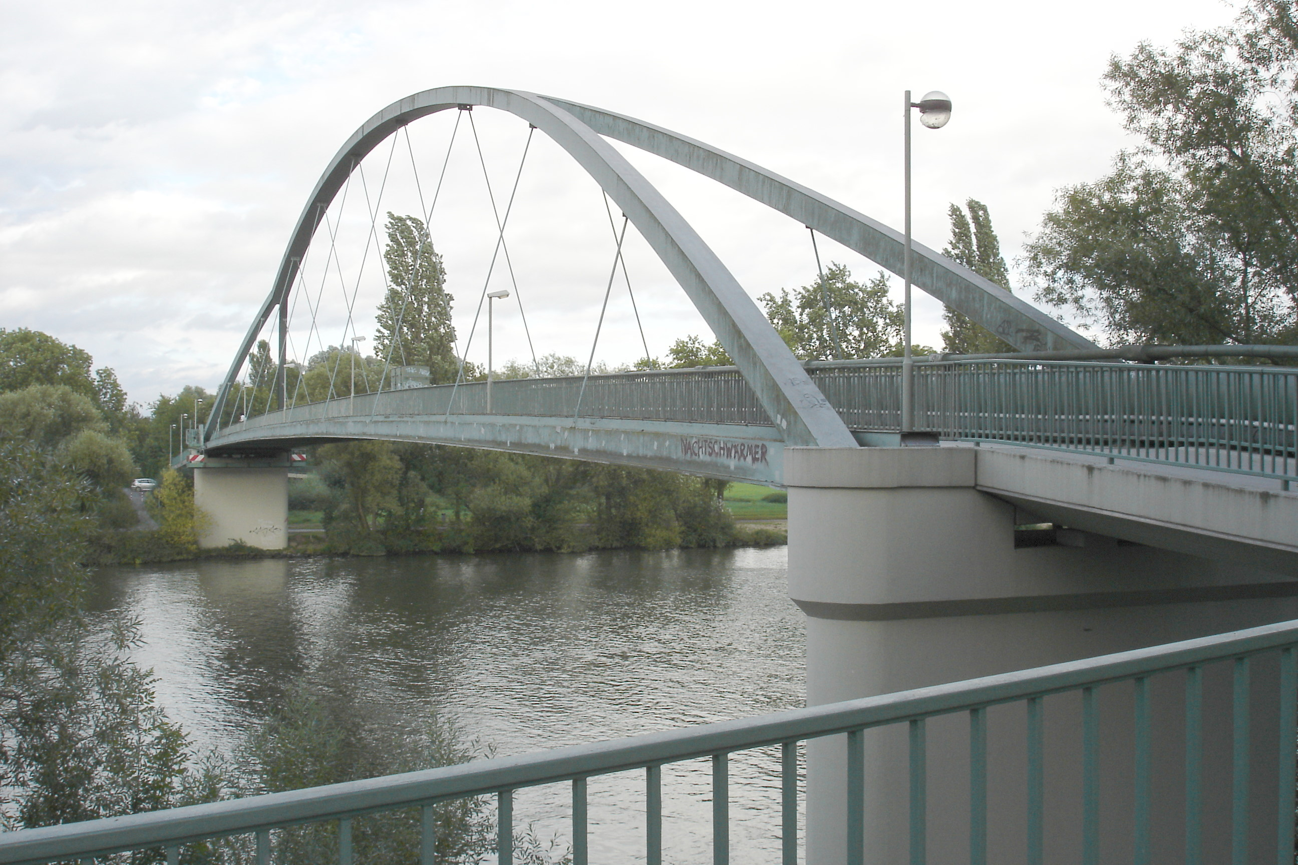 Arthur-von-Weinberg-Steg, Ffm-Fechenheim, Blick von Fechenheim